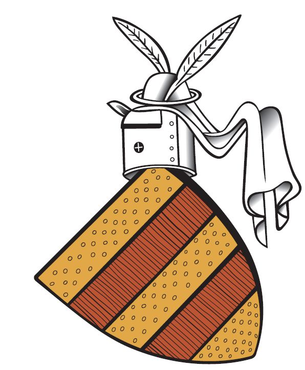 Wappen der Familie von Wittenhorst-Sonsfeld, genehmigt vom heutigen Bewohner Freiherr Friedrich von Wittenhorst-Sonsfeld